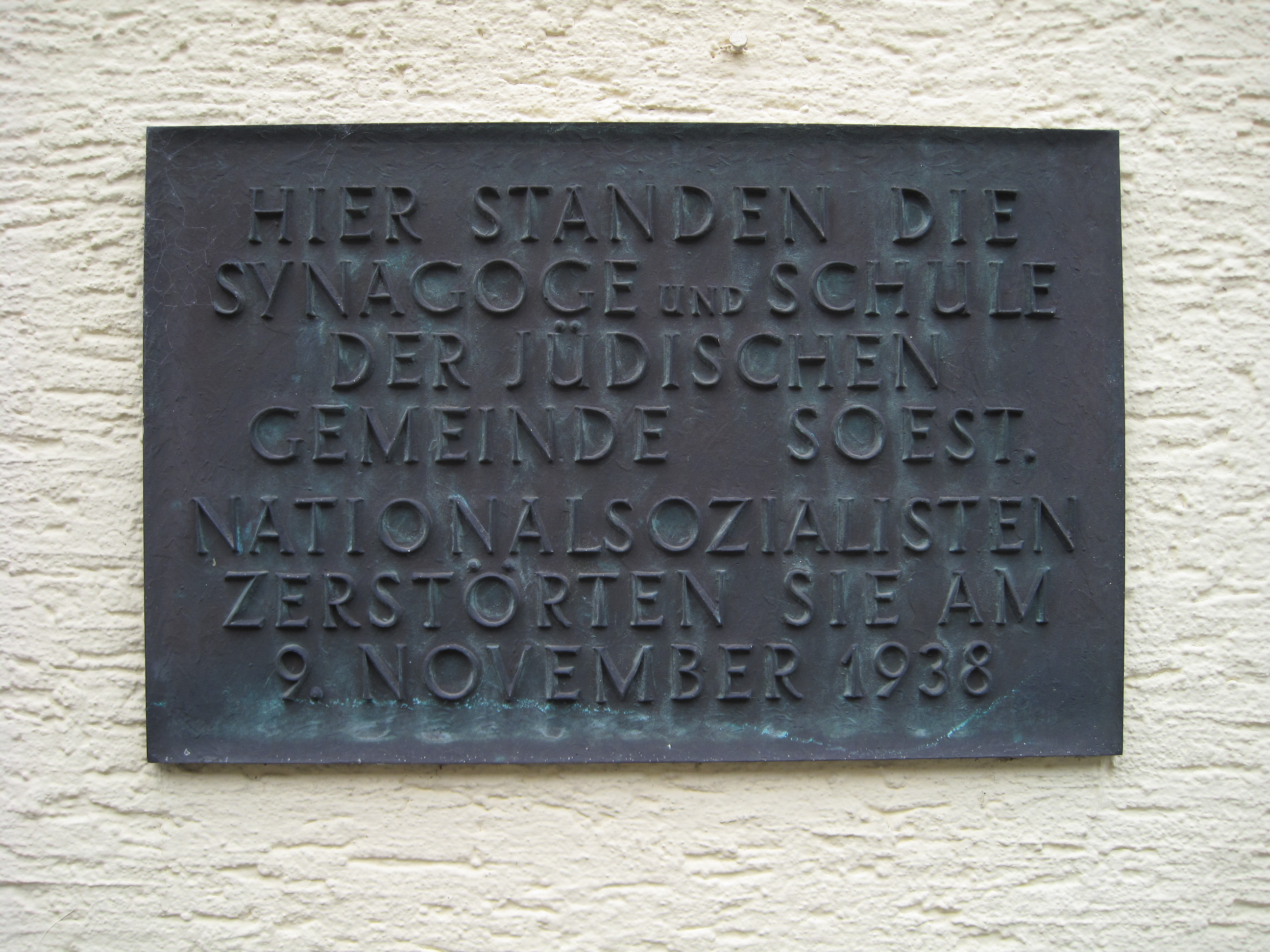 Gedenktafel an die ehemalige Synagoge Soest am Haus Osthofenstraße 50 in Soest.